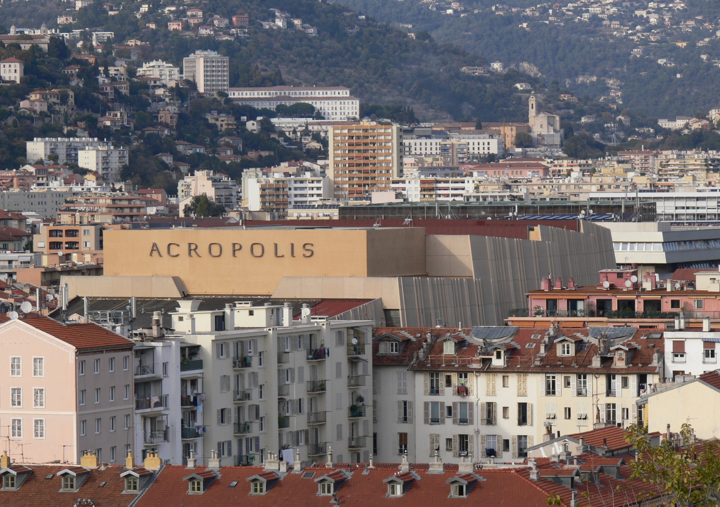 Vue du bâtiment depuis la Coline du château (43.69873, 7.27998)